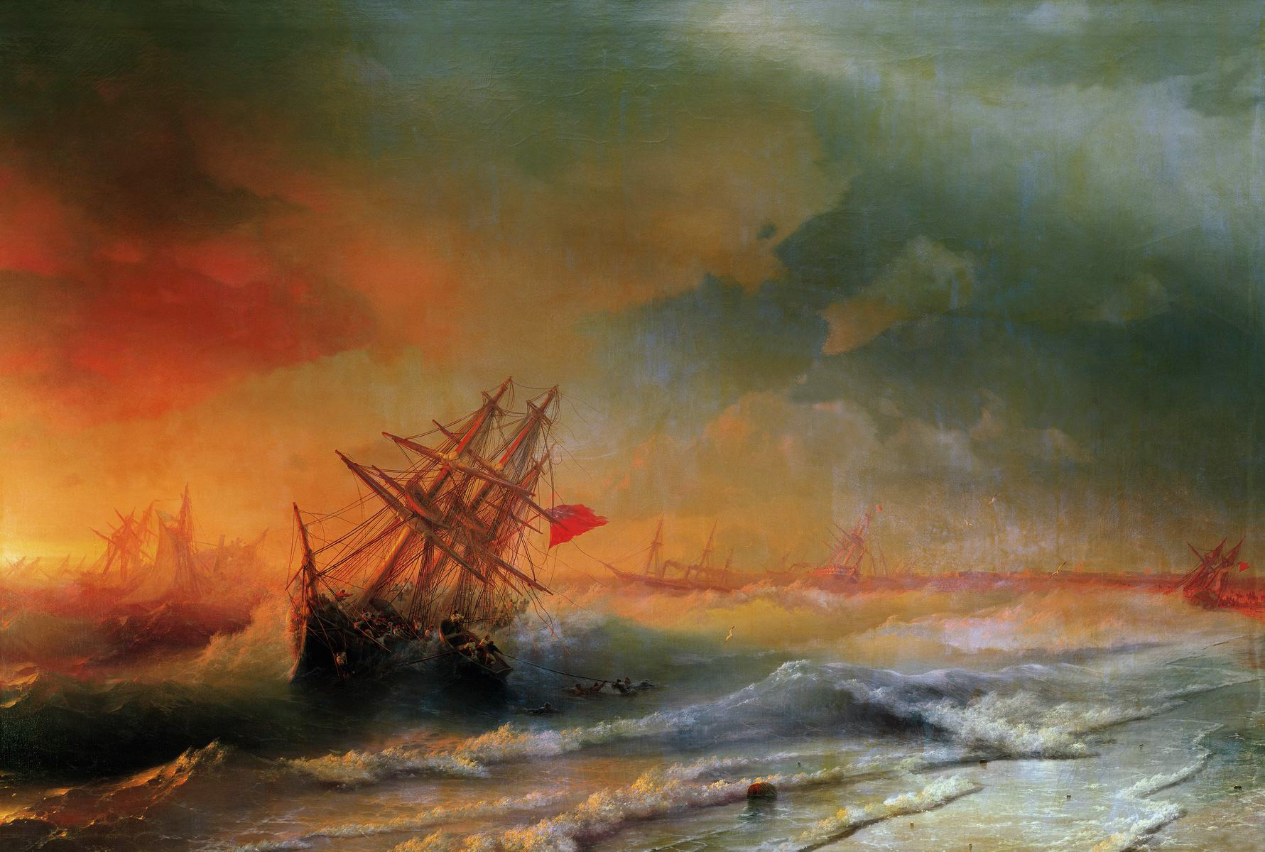 Холст, масло. 206,6х317,3см. Государственный художественно-архитектурный дворцово-парковый музей-заповедник "Царское Село", Пушкин